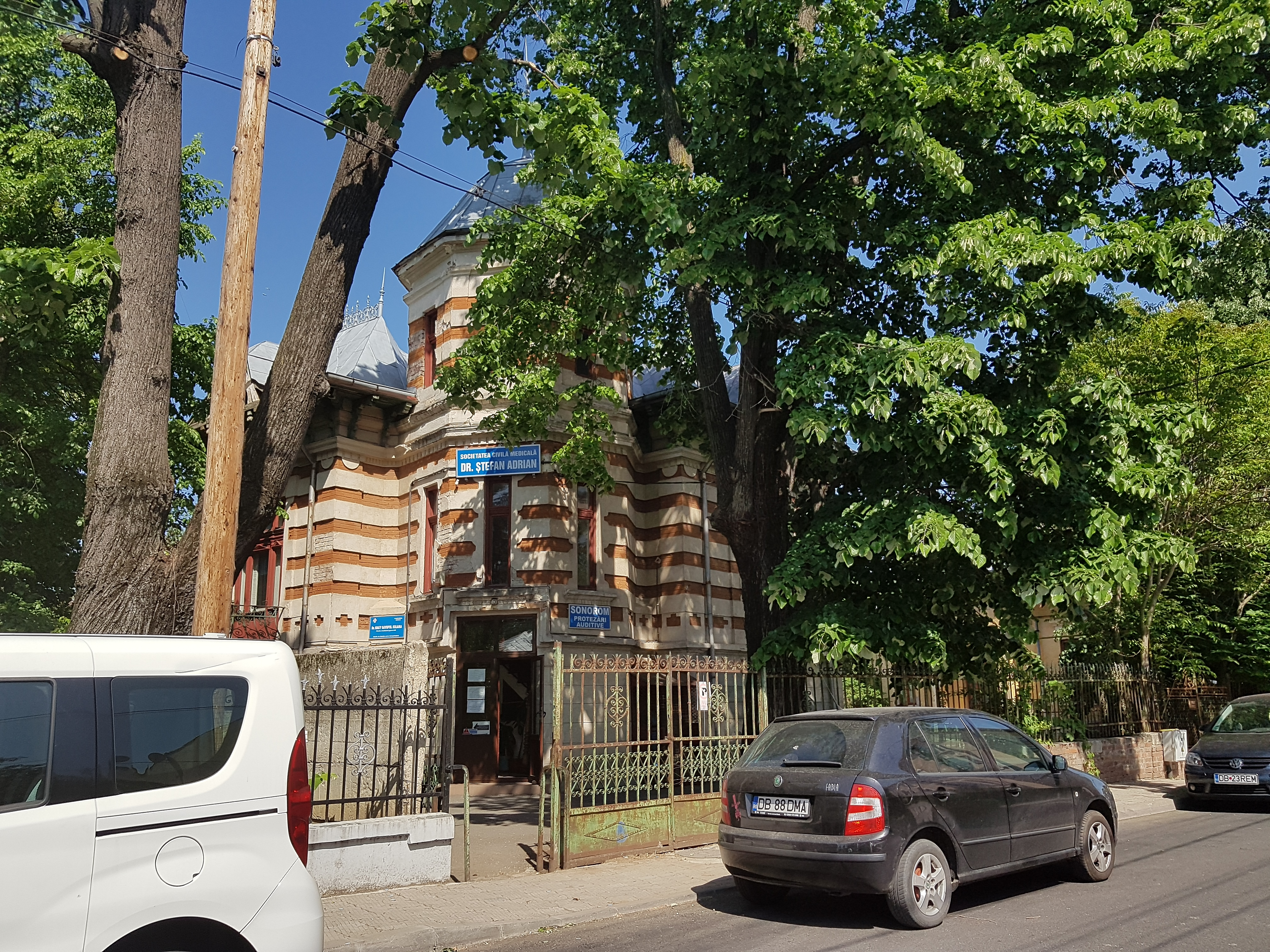 Casa Ștefan